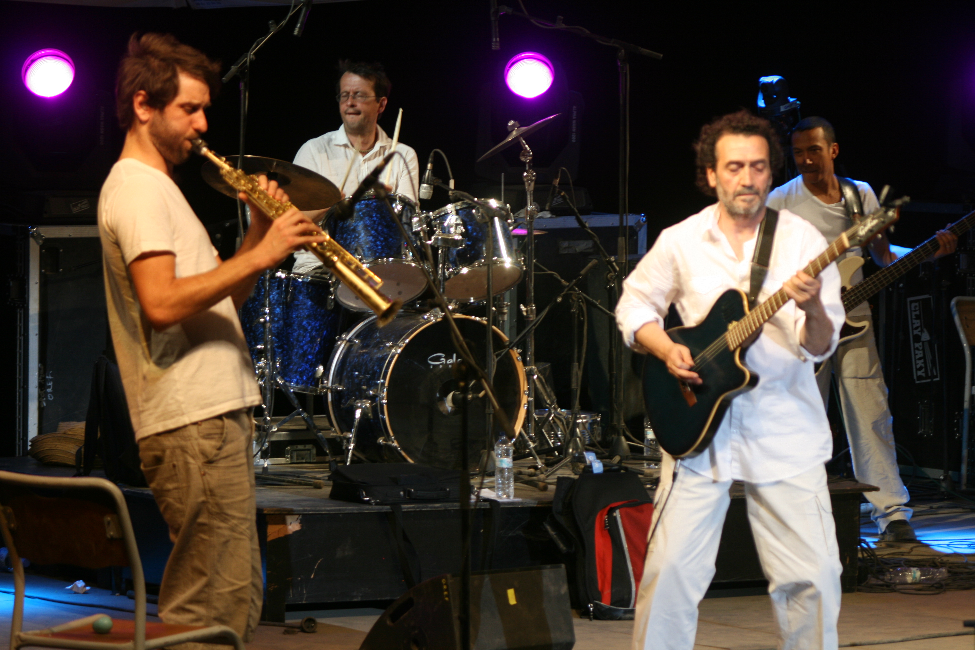 Photo du groupe Cheikh Sidi Bémol à Djoua 2010 (Béjaïa, Algérie) Hocine Boukella à la guitare Hervé Le Bouché : batterie Eric Rakotoarivony : basse Damien Fleau : sax